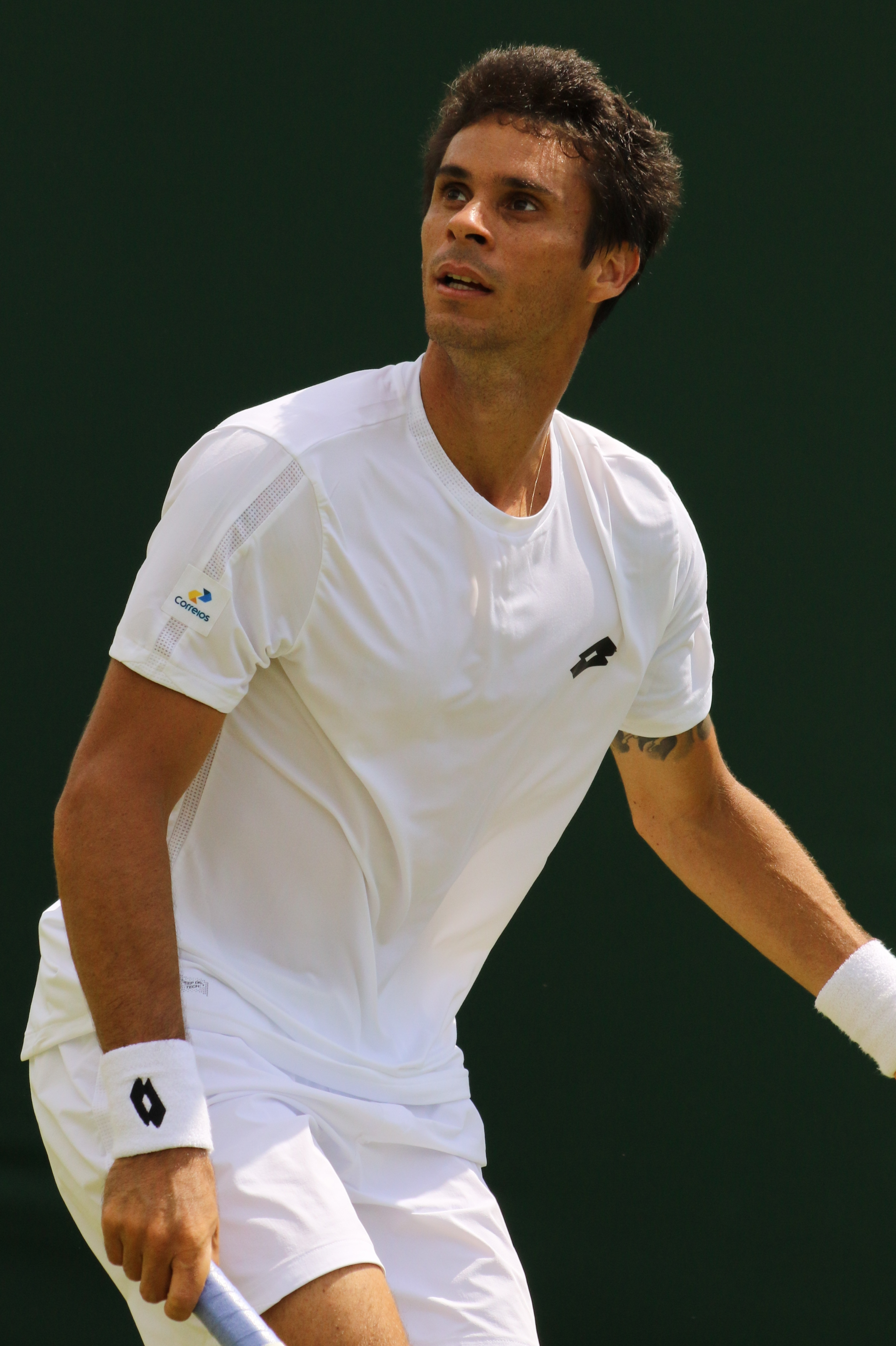 Dutra Silva WM16 (8)